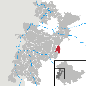 Steinbach in Thuringia - Wartburgkreis